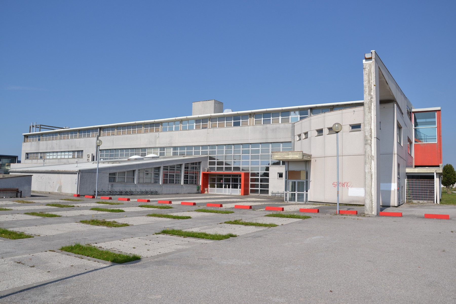 Université du Littoral Côte d'Opale - Bâtiment Poincaré.